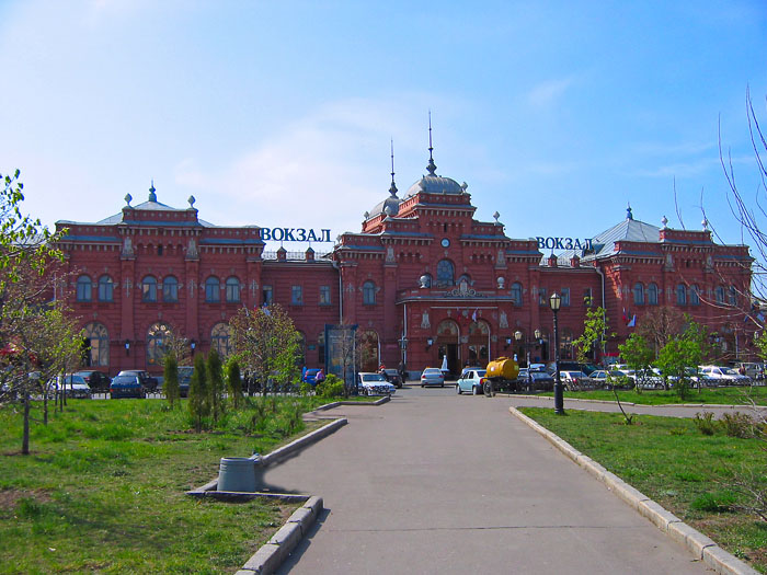 Казанский вокзал